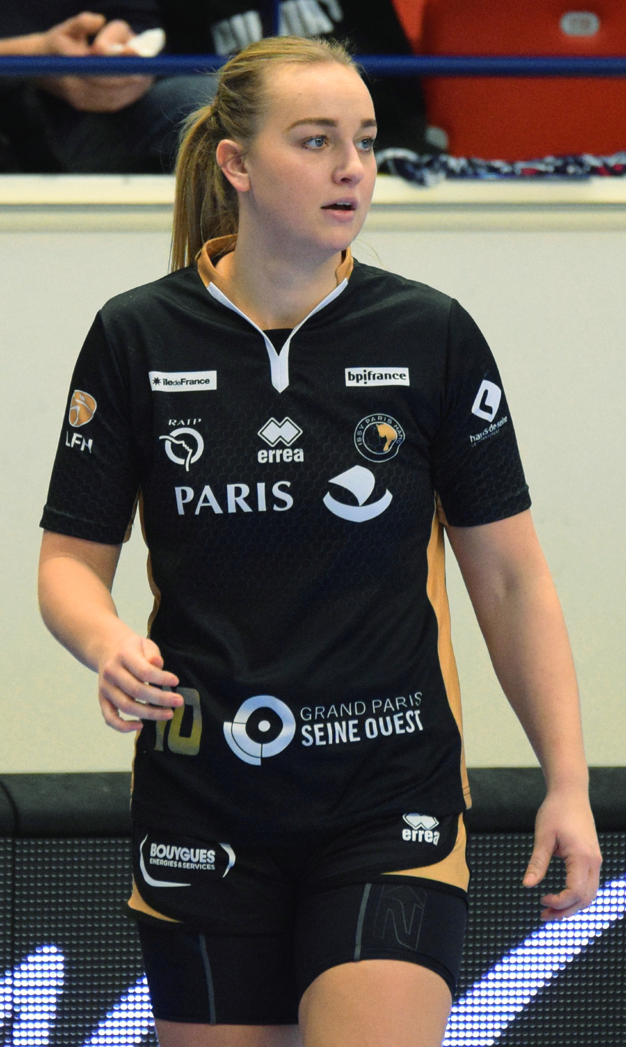 Match de LFH entre Issy Paris Hand et Besançon. A Coubertin, le 10 janvier 2018.